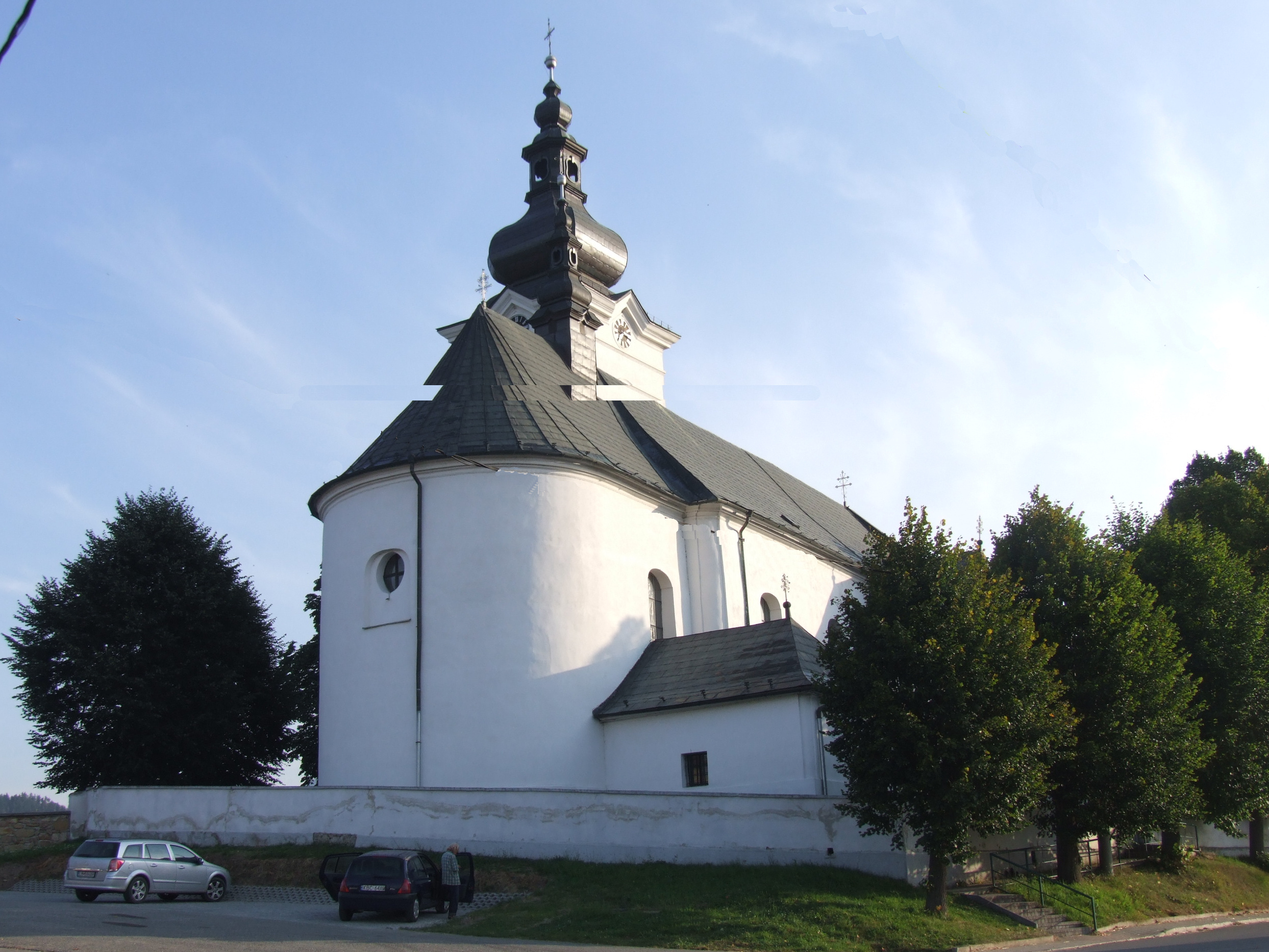 Bobrowiec na Słowacji. Kościół